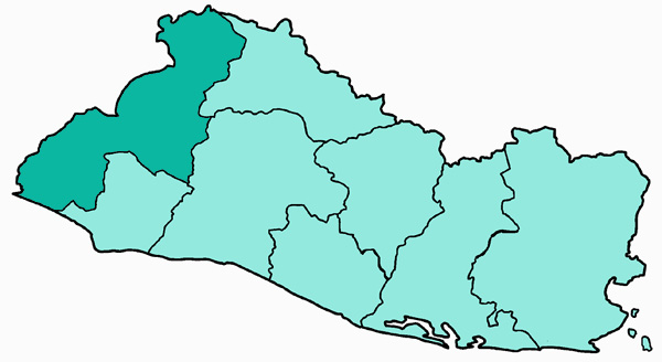 Mappa della diocesi cattolica di Santa Ana, in El Salvador. Lavoro personale eseguito a partire da questa immagine di Commons. Fonte per i confini delle diocesi: *